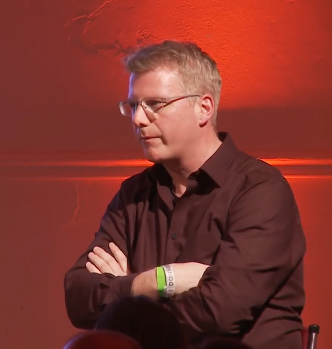 Dr. habil. Nils Köbel ist Professor für Pädagogik an der Katholischen Hochschule Mainz.